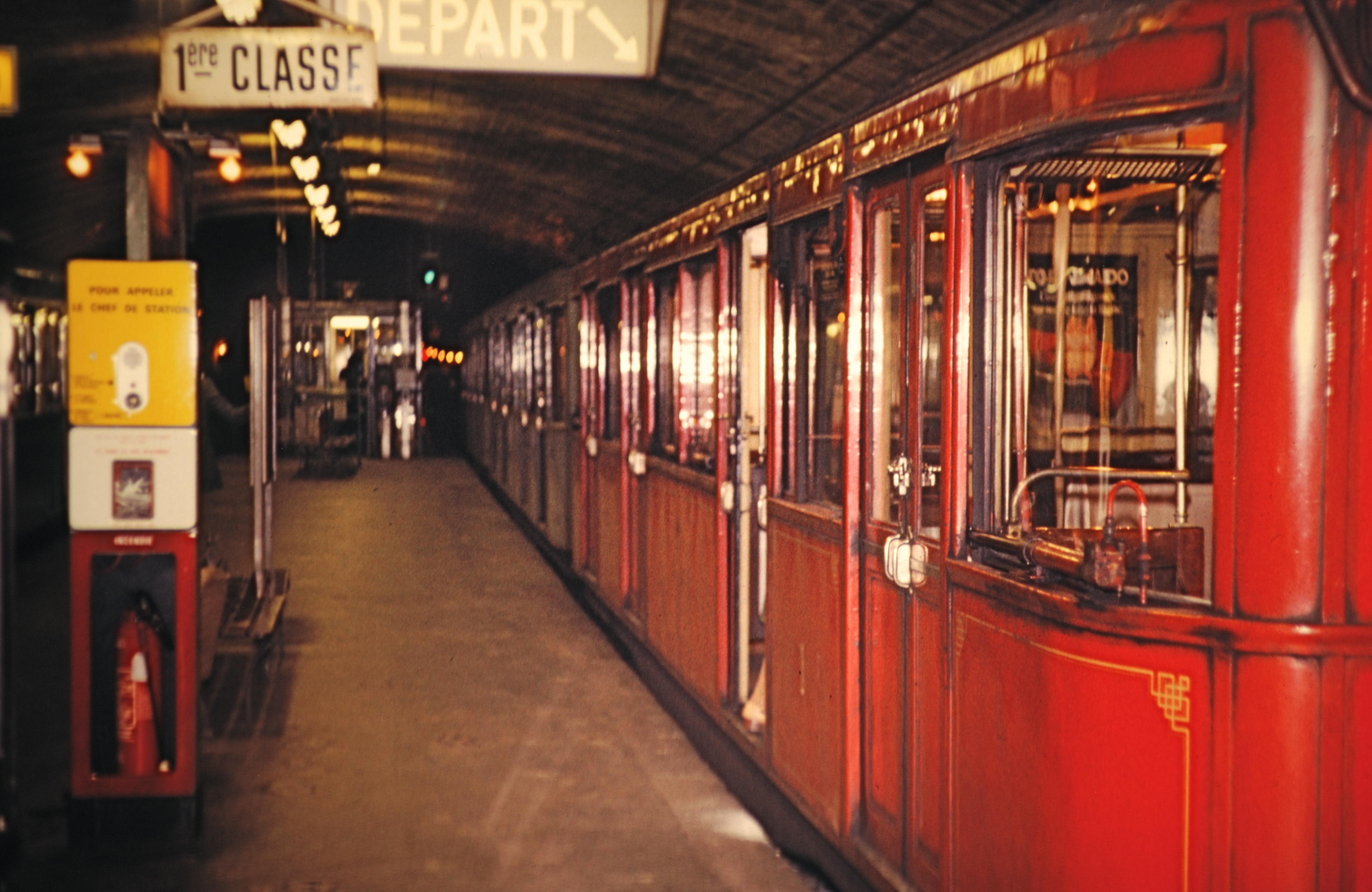 1. Klasse Sprague-Tompson-Wagen der Pariser Metro.